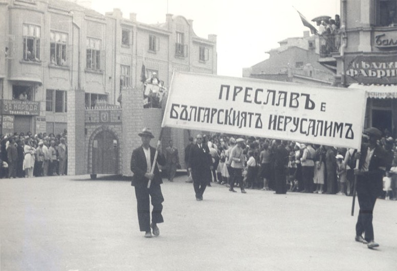 4-ти селскостопански културен и национален събор, 28 - 29 август 1938 г., гр. Варна. Парад на участниците в събора по ул. Княз Борис І. На преден план са представителите на град Преслав.